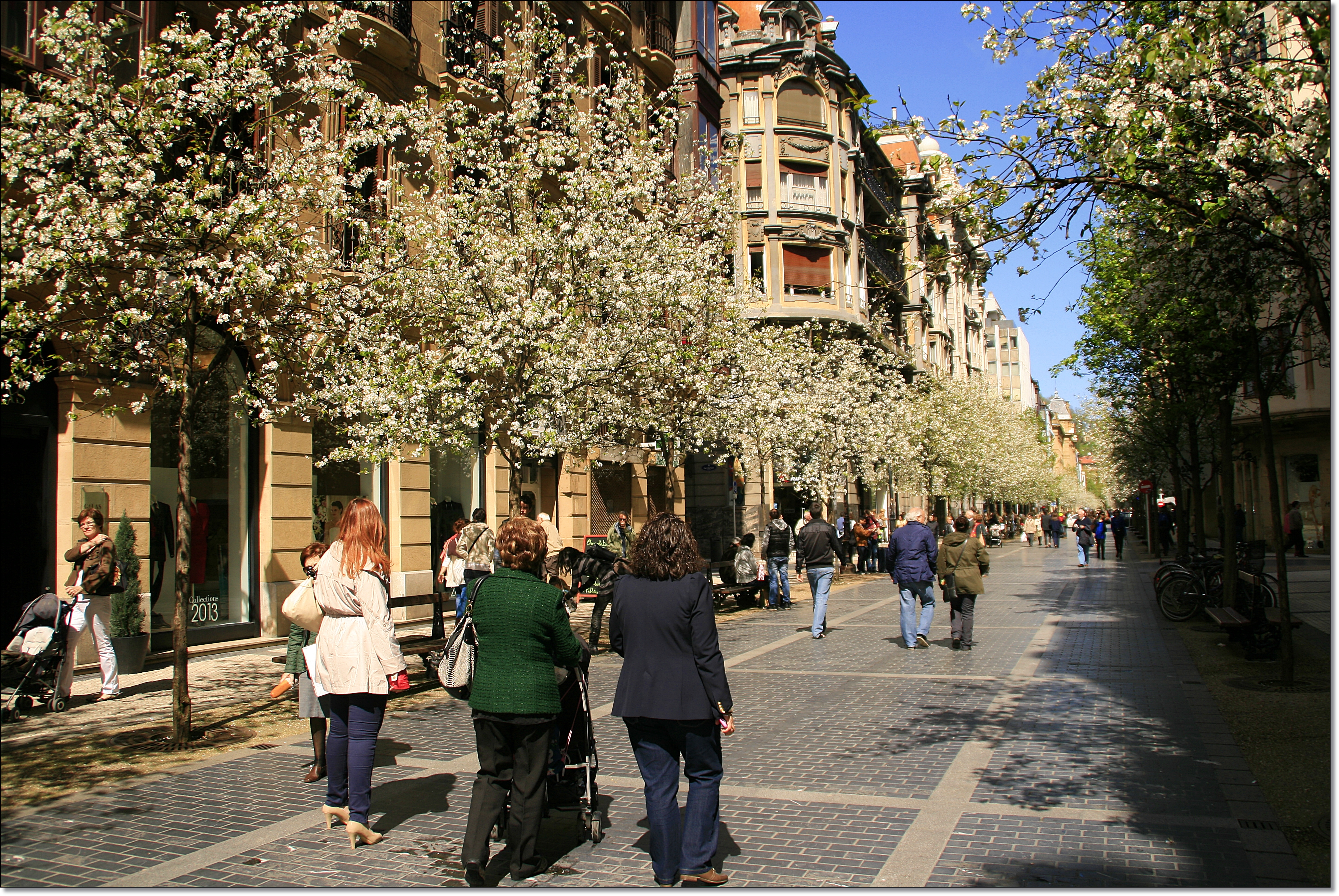 San Sebastián - Donostia.